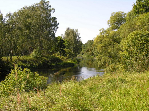 Metų laikai: vasara Foto: Algirdas, 2005